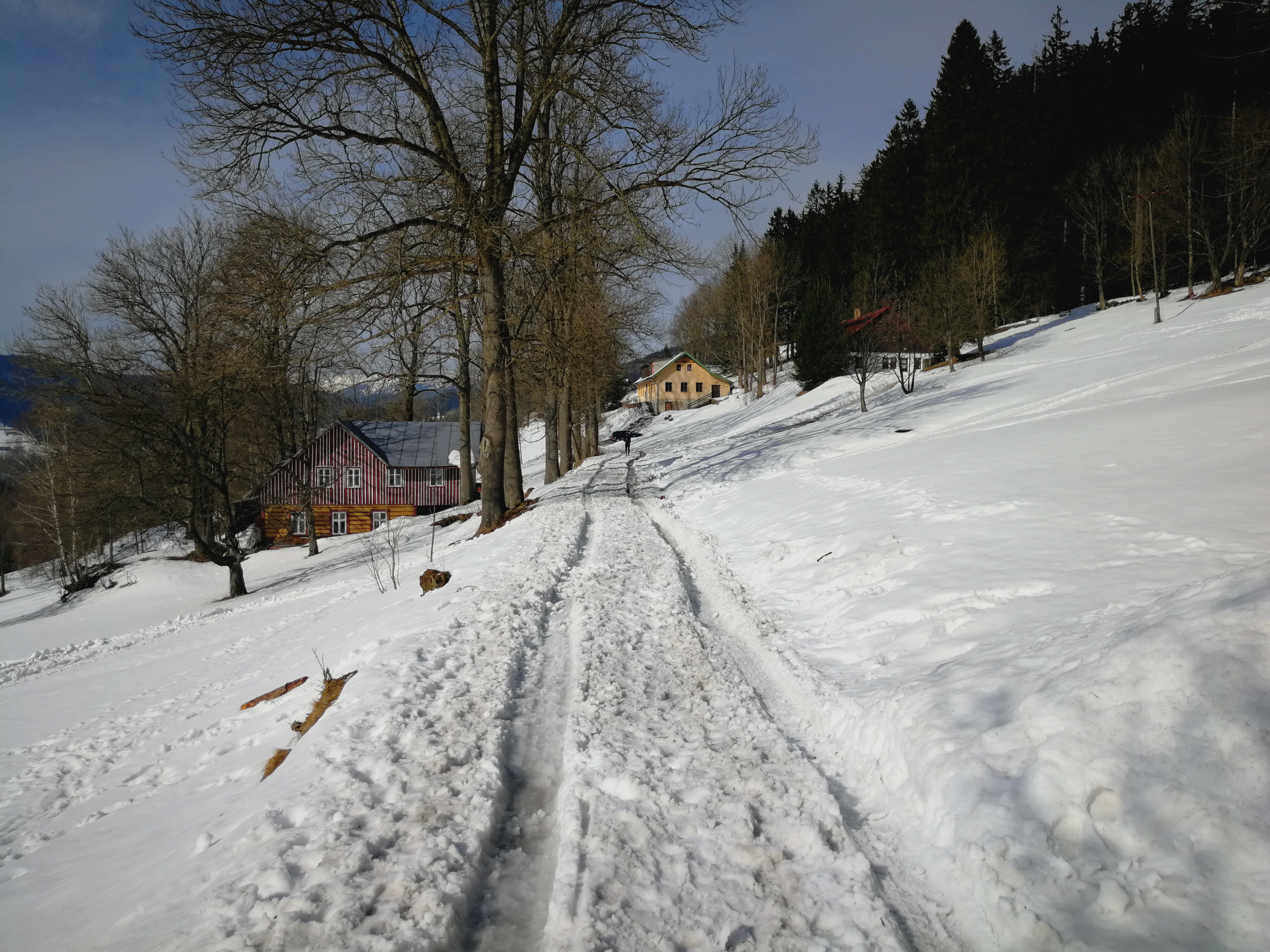 Horní Herlíkovice. Okres Trutnov, Česká republika.